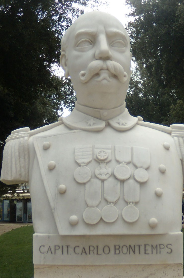 Busto restaurato del Cap. Carlo Bontemps